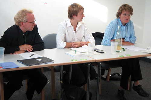 set Grüner Zukunftskongress, 1.-3.9.2006, Berlin Sascha Spouhn, Katja Husen, Susanne Beer Mehr im Blog